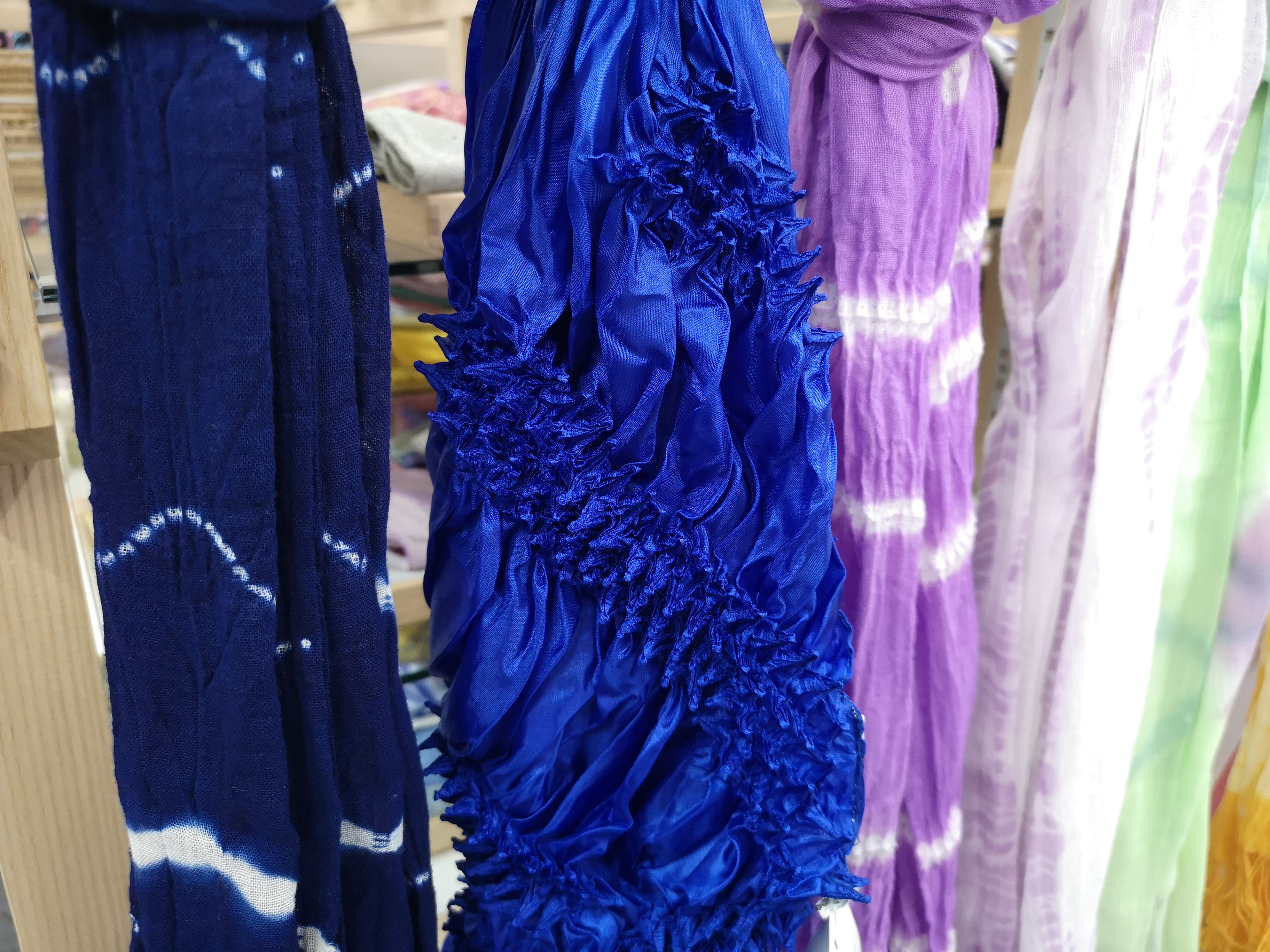 21世紀の有松絞りのスカーフ。伝統の藍染のほか人工的な染料も用いたり、絞りの皺をそのまま形状記憶させるなど、様々な色彩や表現を採り入れた製品がある。